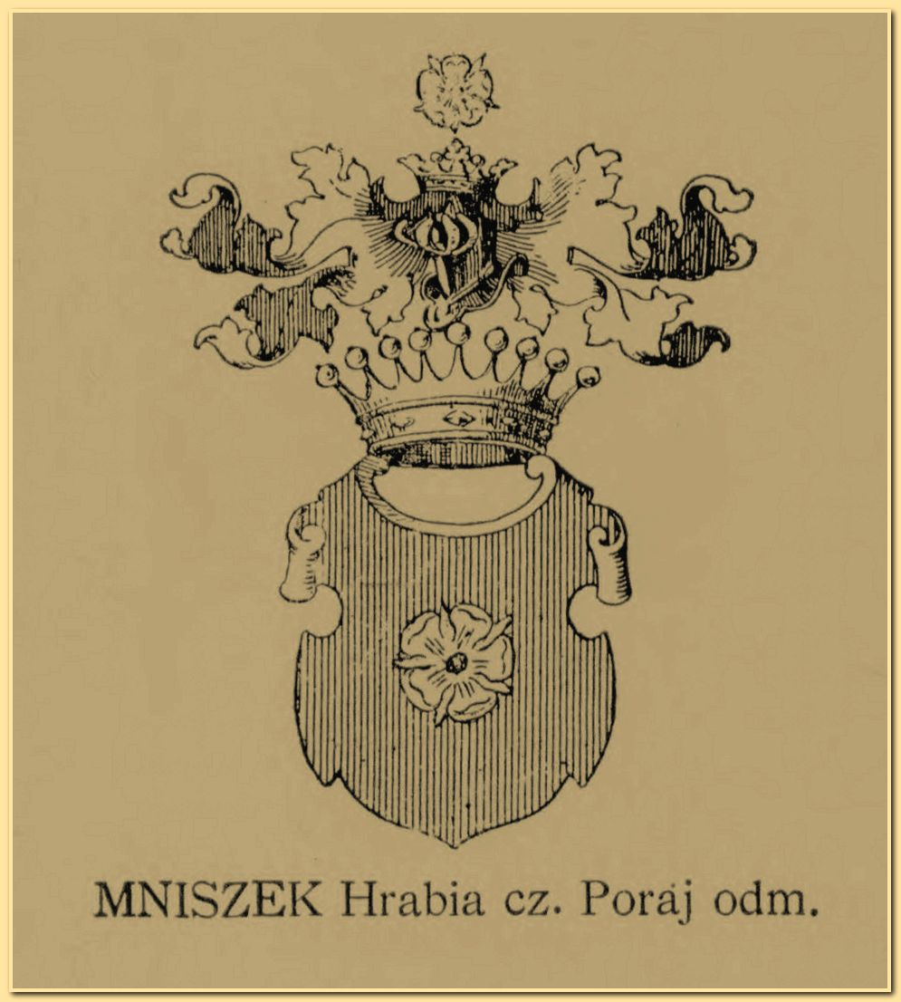 Herb Mniszek - Hrabia z tablic herbowych Juliusza Ostrowskiego